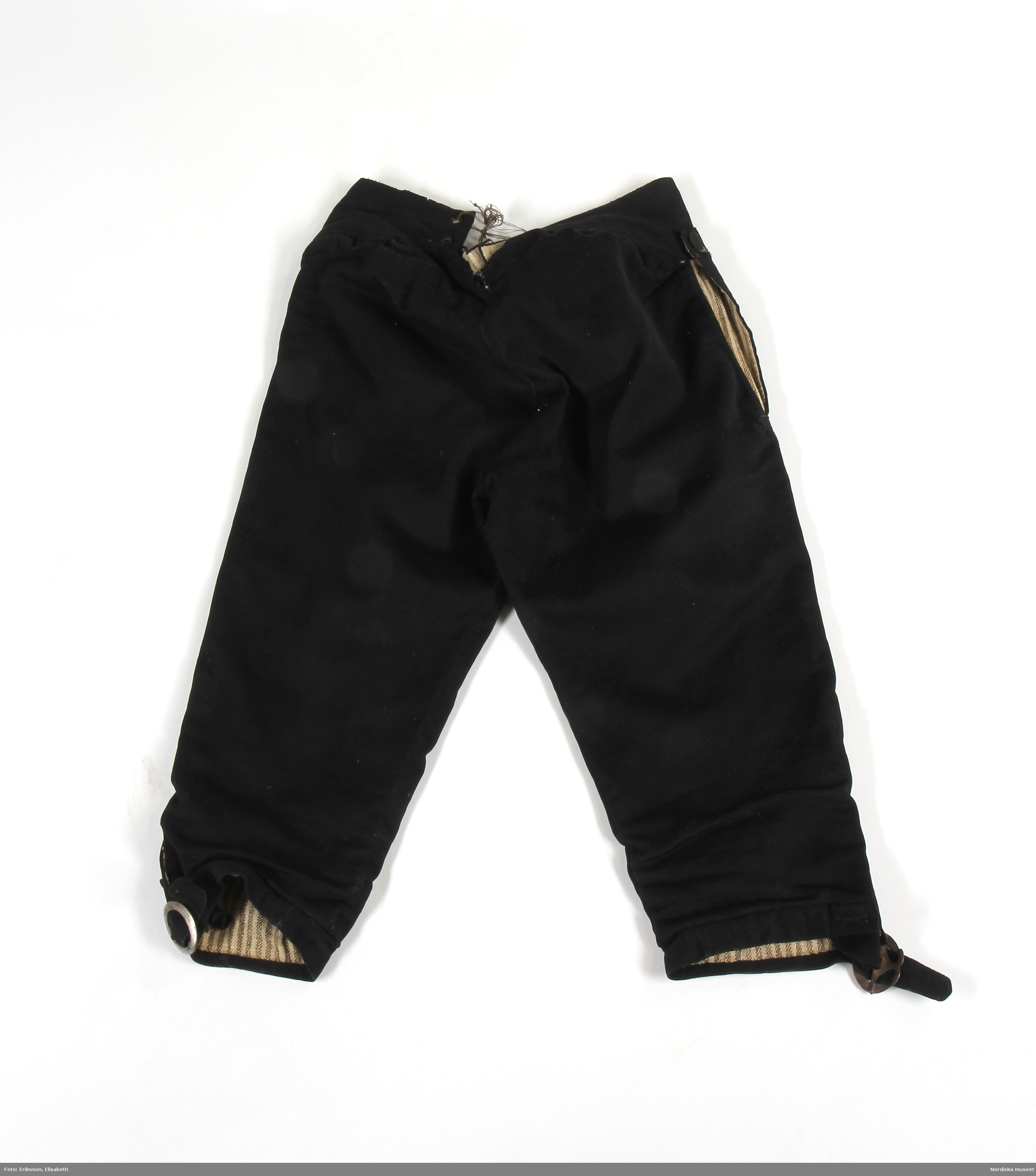 Byxor